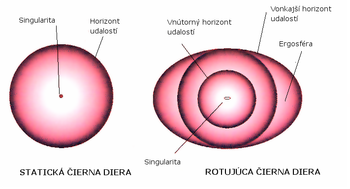 Nákres rotujúcej a statickej čiernej diery autor: Adrian